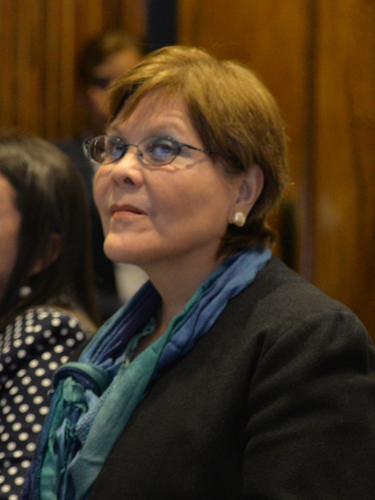 La Primera Dama de Guatemala, Ana Violeta de Maldonado, visitó la Embajada de Estados Unidos